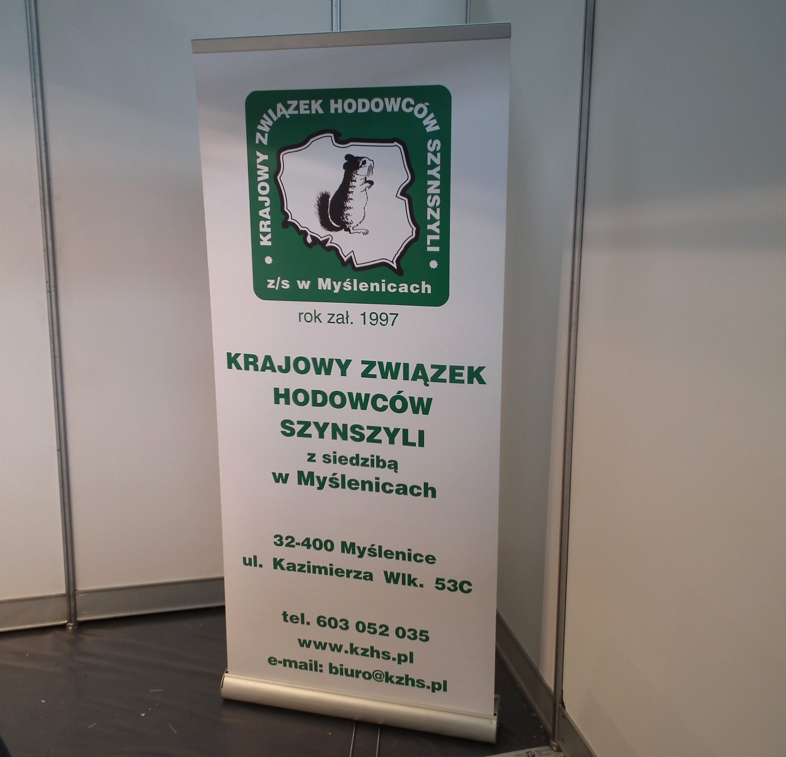 XXVIII Krajowa Wystawa Zwierząt Hodowlanych - Poznań, maj 2017r.